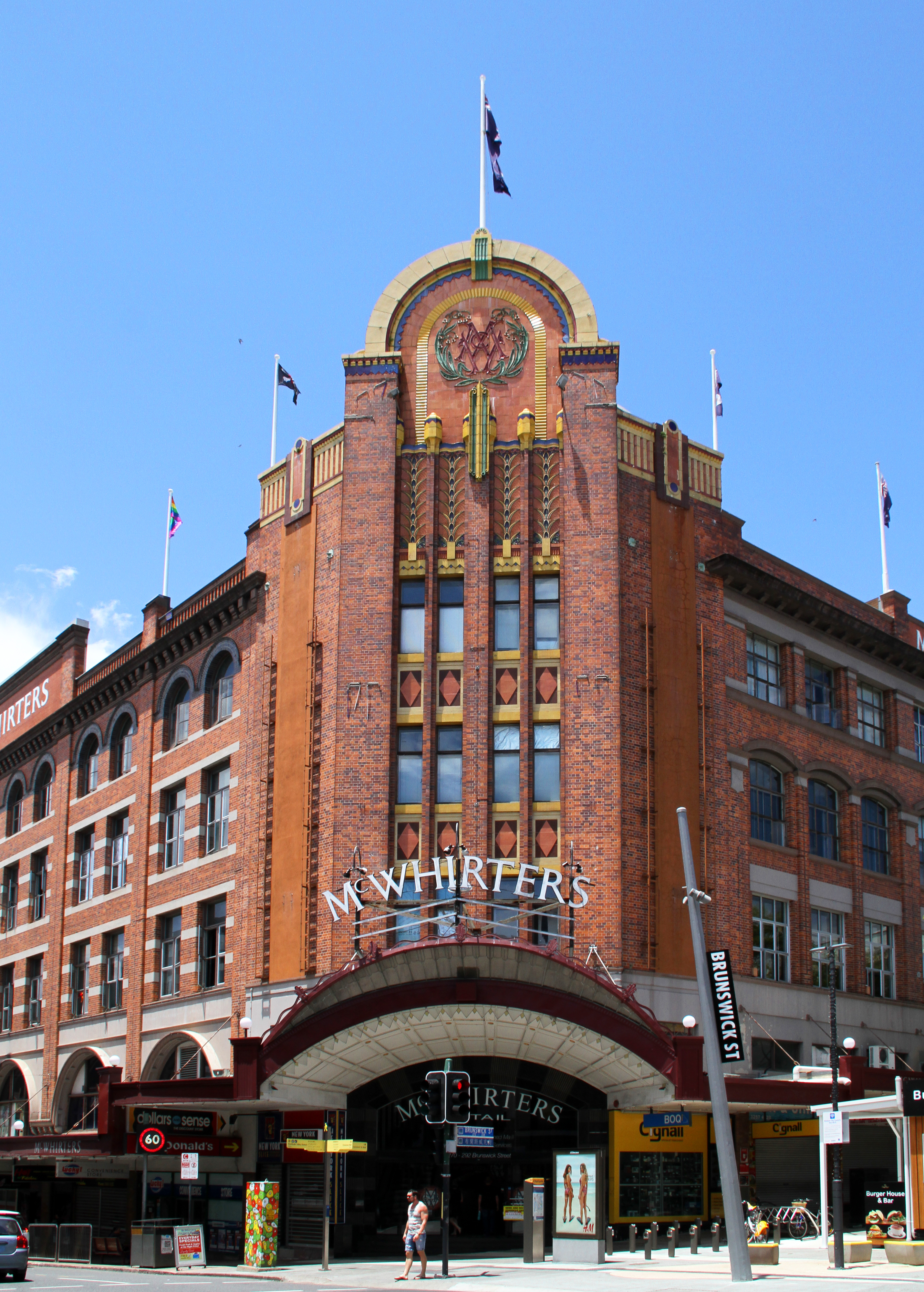 McWhirters 5